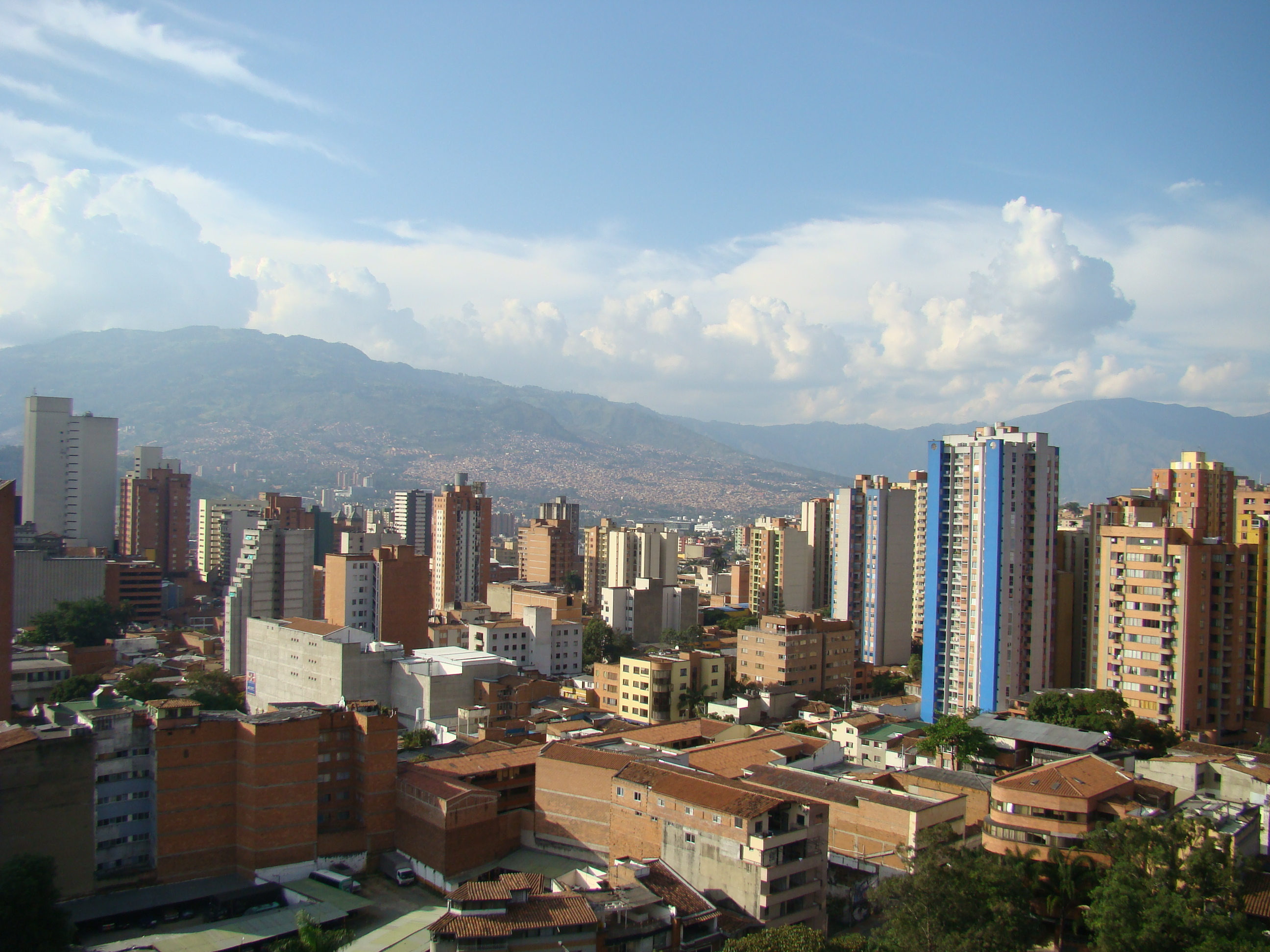 Medellín, Antioquía, Colombia